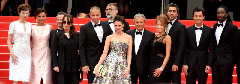 L'équipe de "Qu'est-ce qu'on a fait au bon Dieu ?" au festival de Cannes